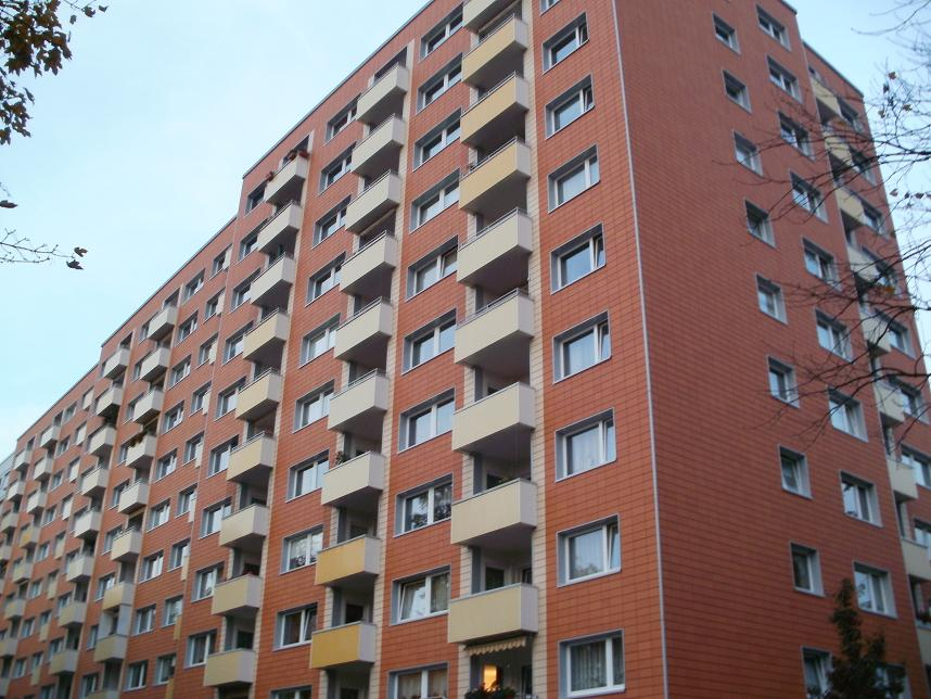 Hochhäuser in Hamburg-Steilshoop